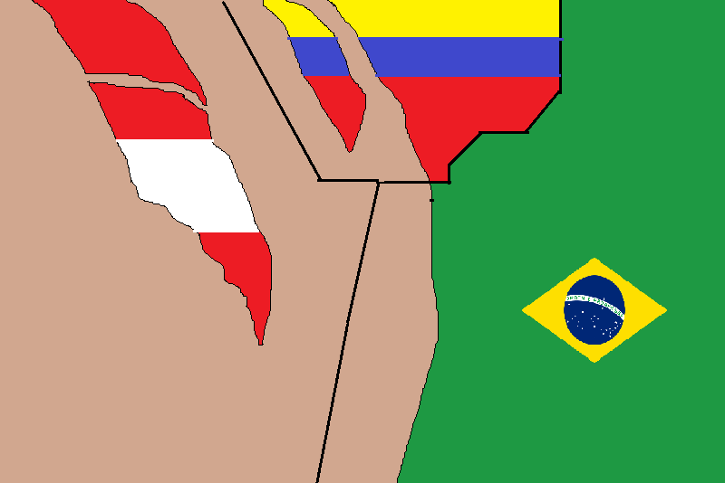 La Triple Frontera entre Colombia, Brasil y Perú con sus respectivas banderas